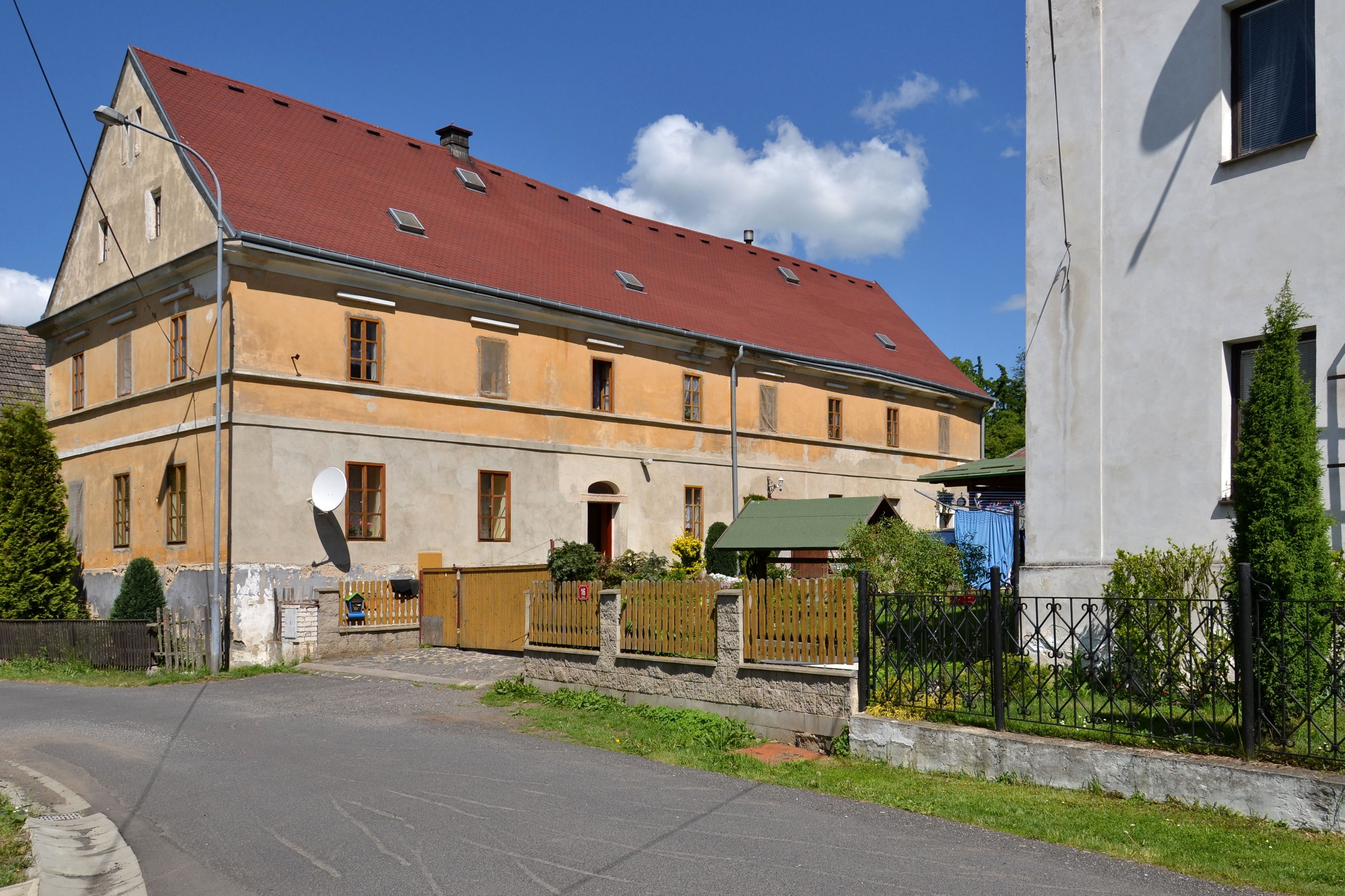 Suletice – dům čp. 16